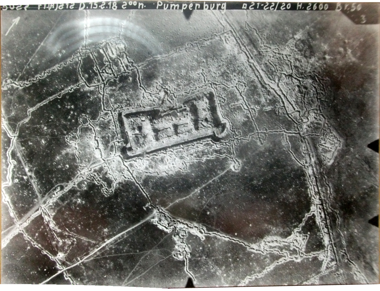 Photographie aérienne militaire allemande du fort de la Pompelle. Le bas de l'image est au sud.